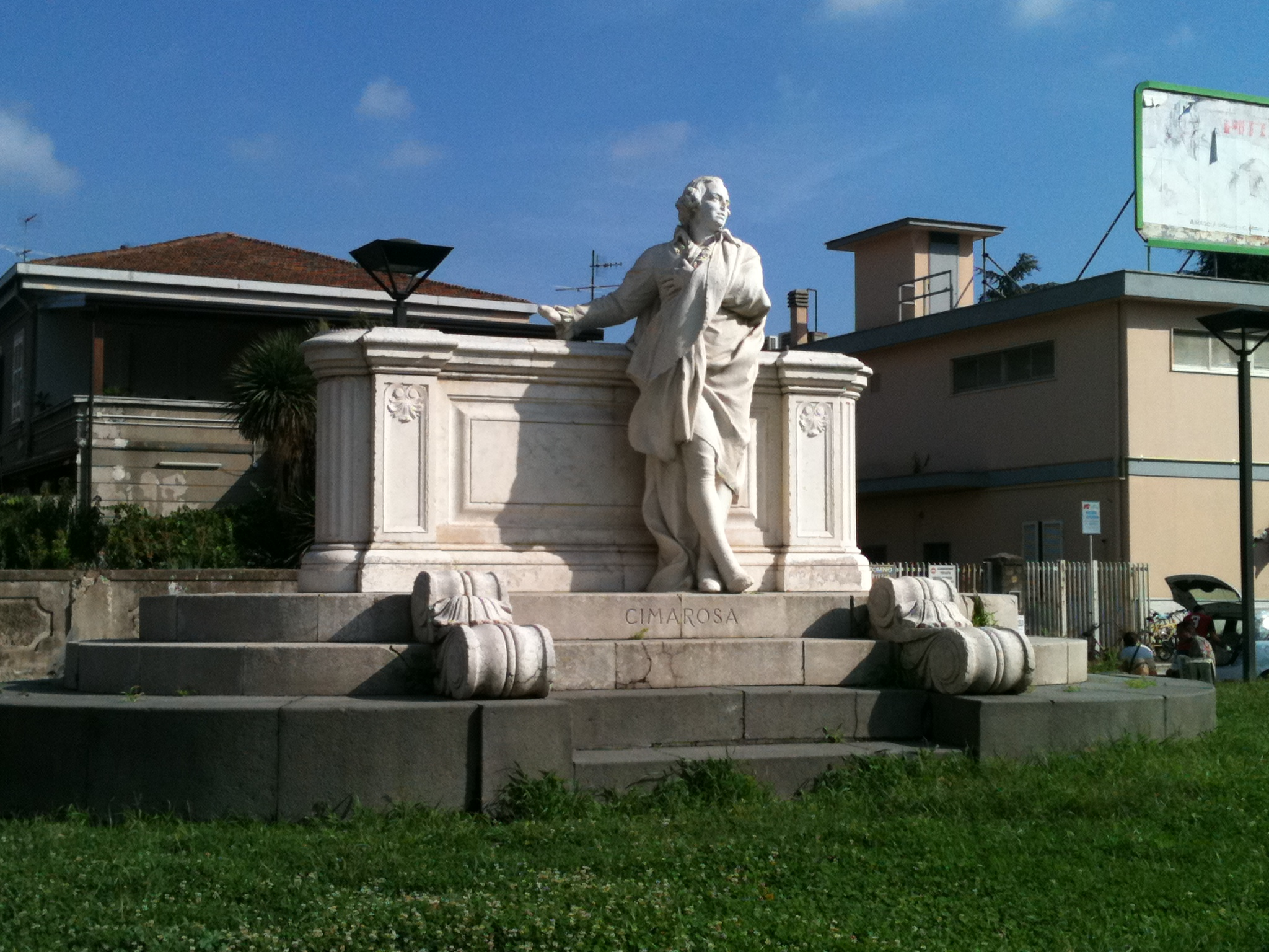 Opera propria